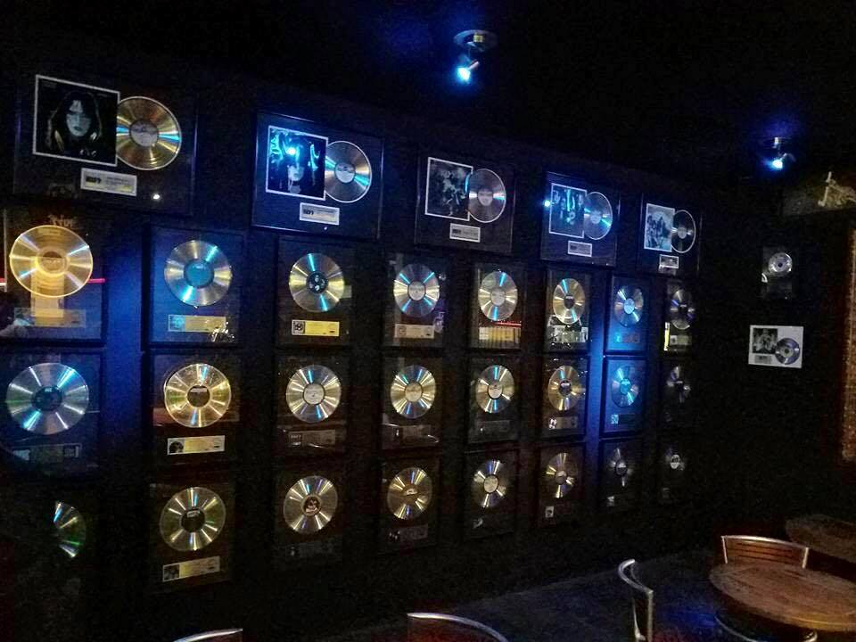 Todos los discos de plata, oro y platino originales de KISS certificados por la RIAA